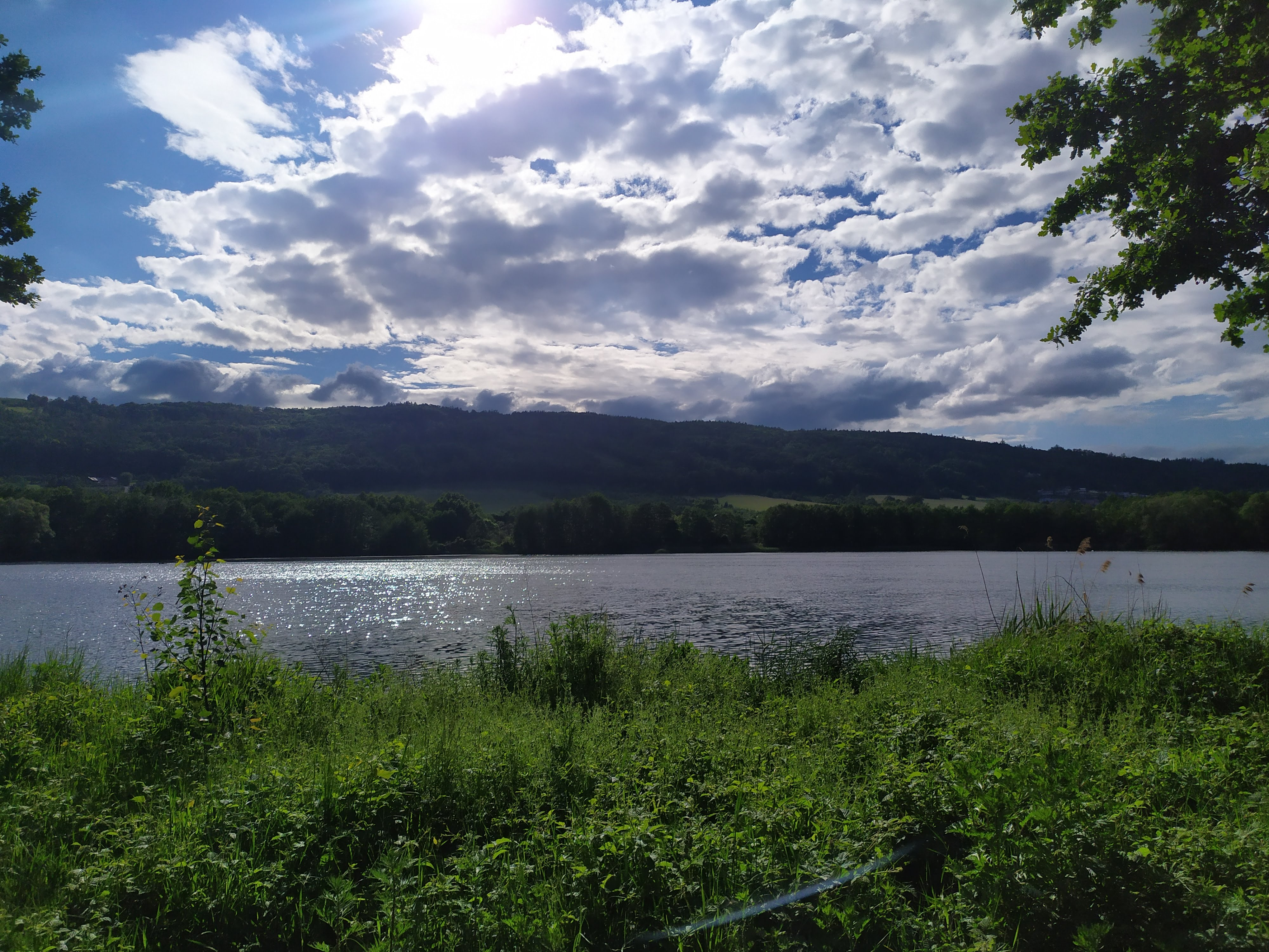 Trněný rybník s Veselským kopcem v pozadí